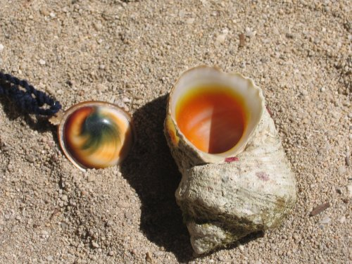 Turbo petholatus mit Verschlussstein; Ort: Togian Islands/Sulawesi/Indonesien